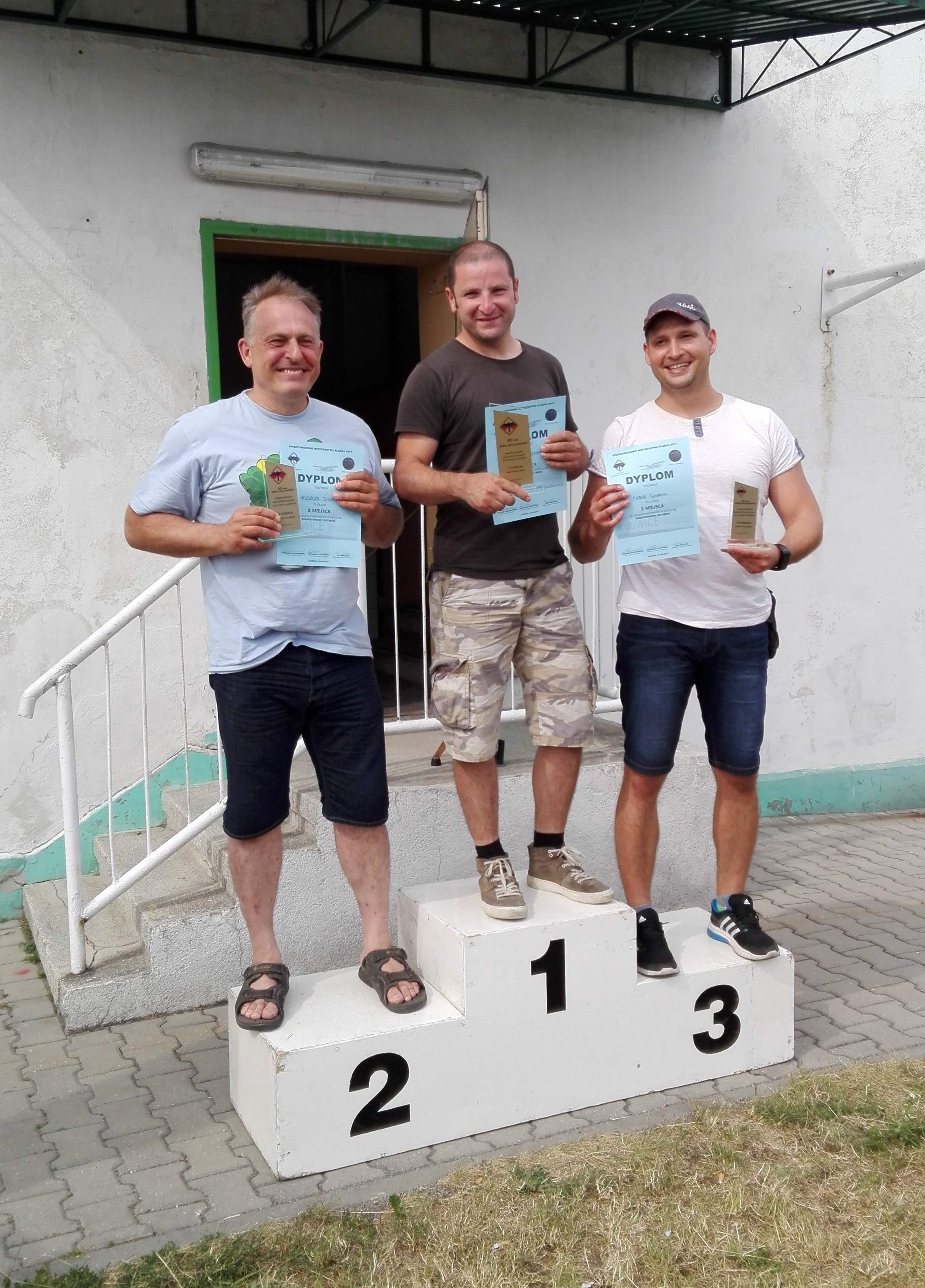 Spadochronowe Mistrzostwa Śląska 2017, zwycięży kategorii spadochrony szybkie: I miejsce – Wojciech Kielar, II miejsce – Jacek Huszcza, III miejsce – Tymoteusz Tabor